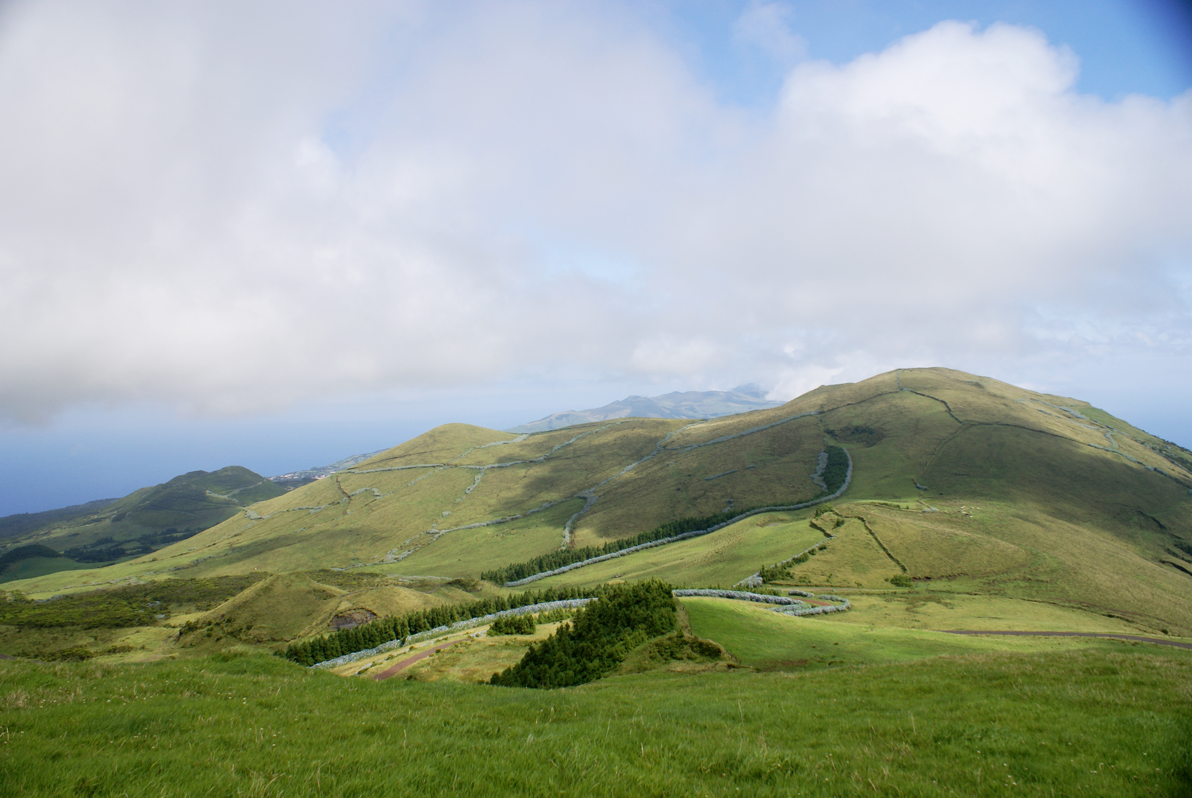 Pico do Areeiro, Norte Grande, Calheta, ilha de São Jorge, Açores